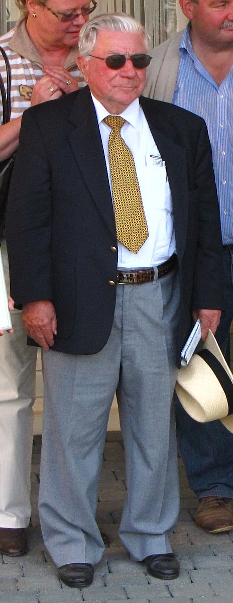 Hein Bollow bei einer Siegerehrung in Bad Harzburg